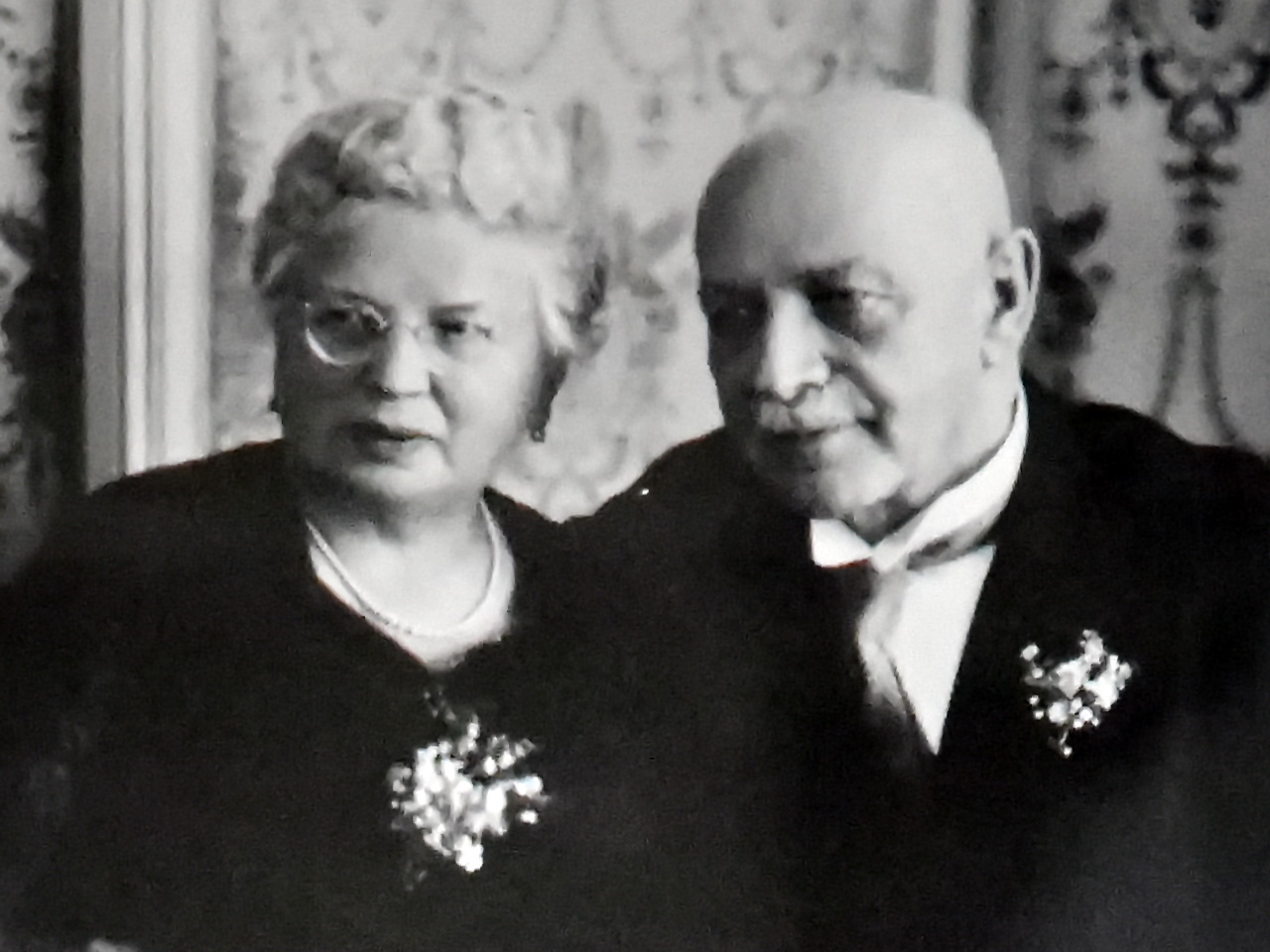 Schloss (Castle) in Uster (Switzerland) : Mr and Mrs Jakob Heusser-Staub in 1939.